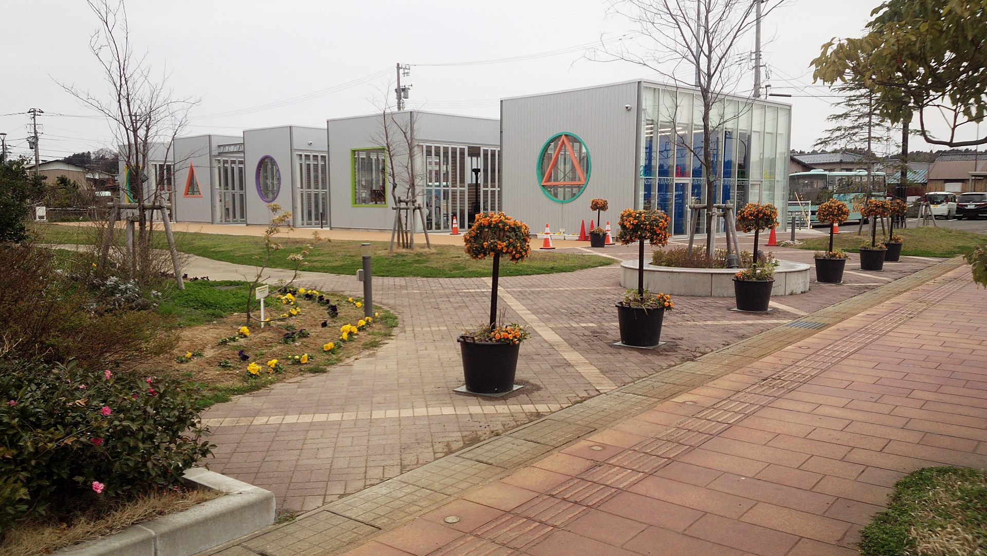 JR芦原温泉駅西側に市民と観光客の交流拠点として完成した「ａキューブ」